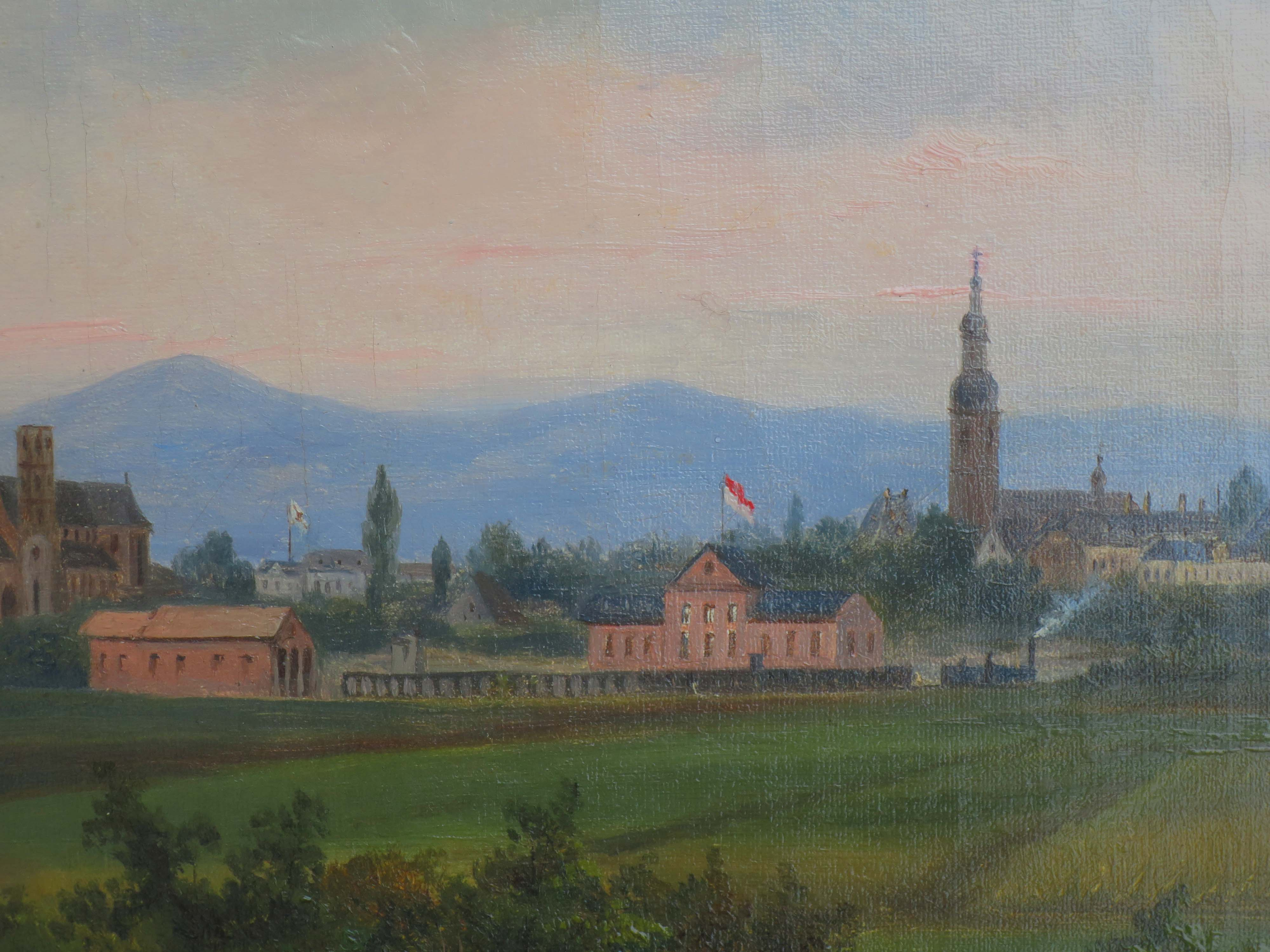 Ölgemälde "Panorama der Stadt Worms" von Nicolaus Berkhout. Hier: Ausschnitt: Erster Bahnhof von Worms